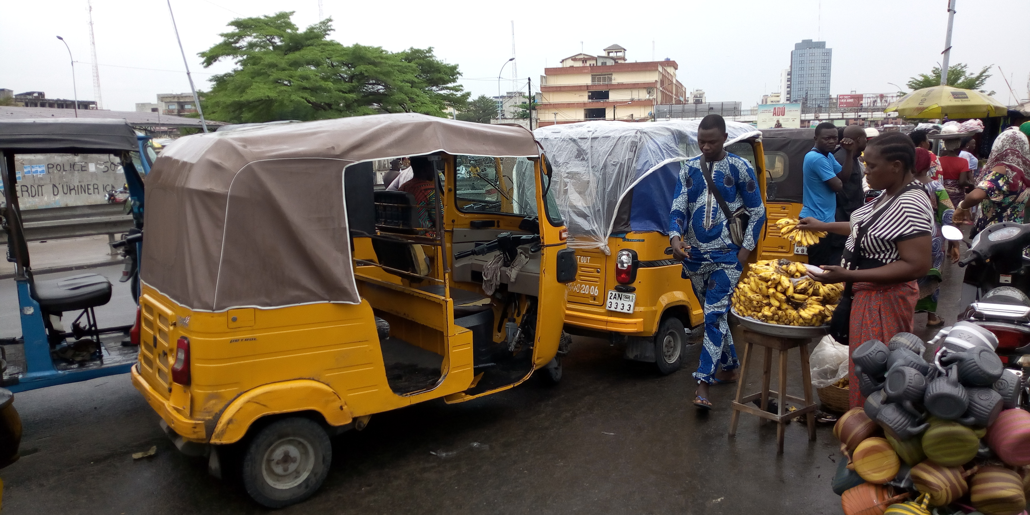 Station des moto taxi à trois roues au marché dantopka This is an image with the theme "Africa on the Move or Transport" from: Benin